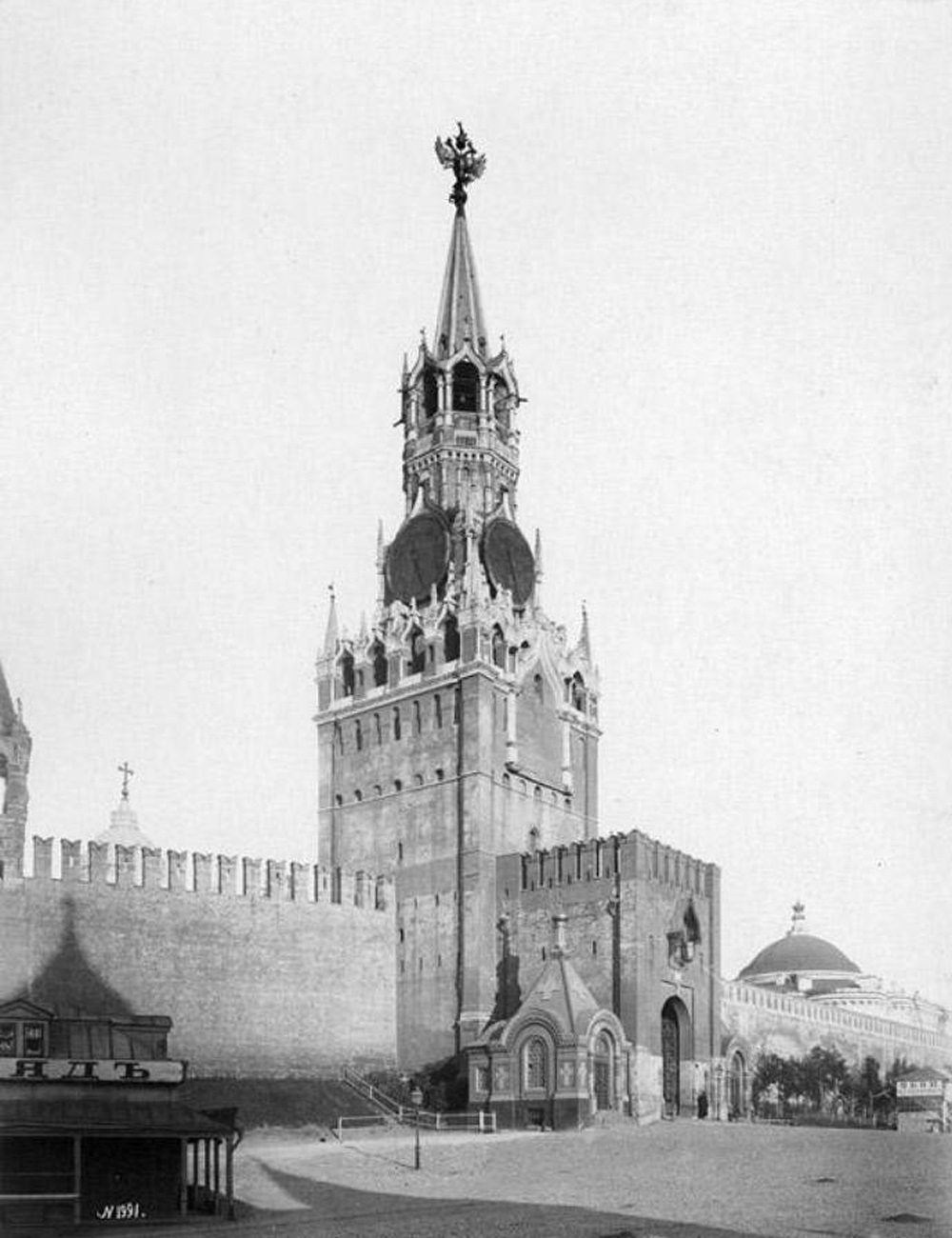 Спасская башня Московского Кремля. 1880-е гг.